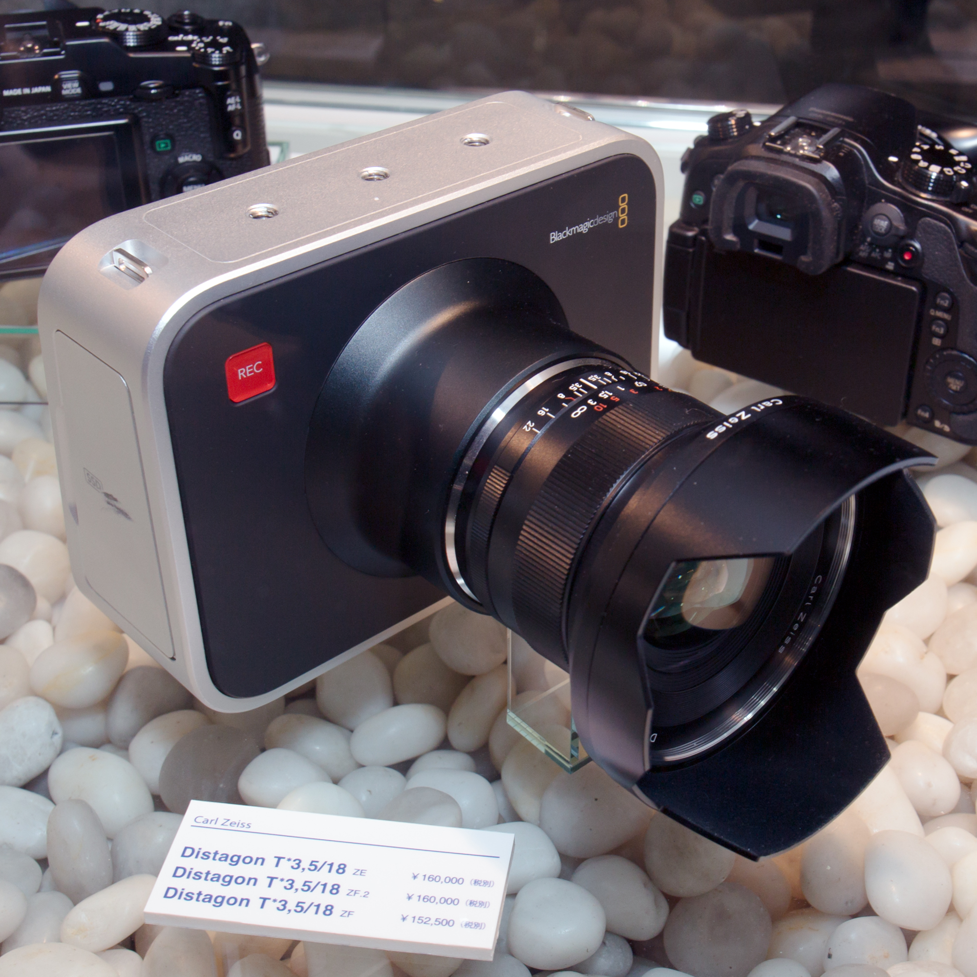 CP+ 2013: 2012 Blackmagic Cinema Camera